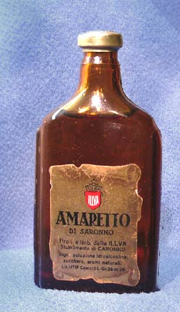 Disaronno